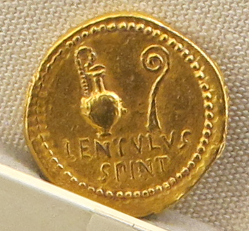 Ancient Roman coins in the Palazzo Massimo alle Terme